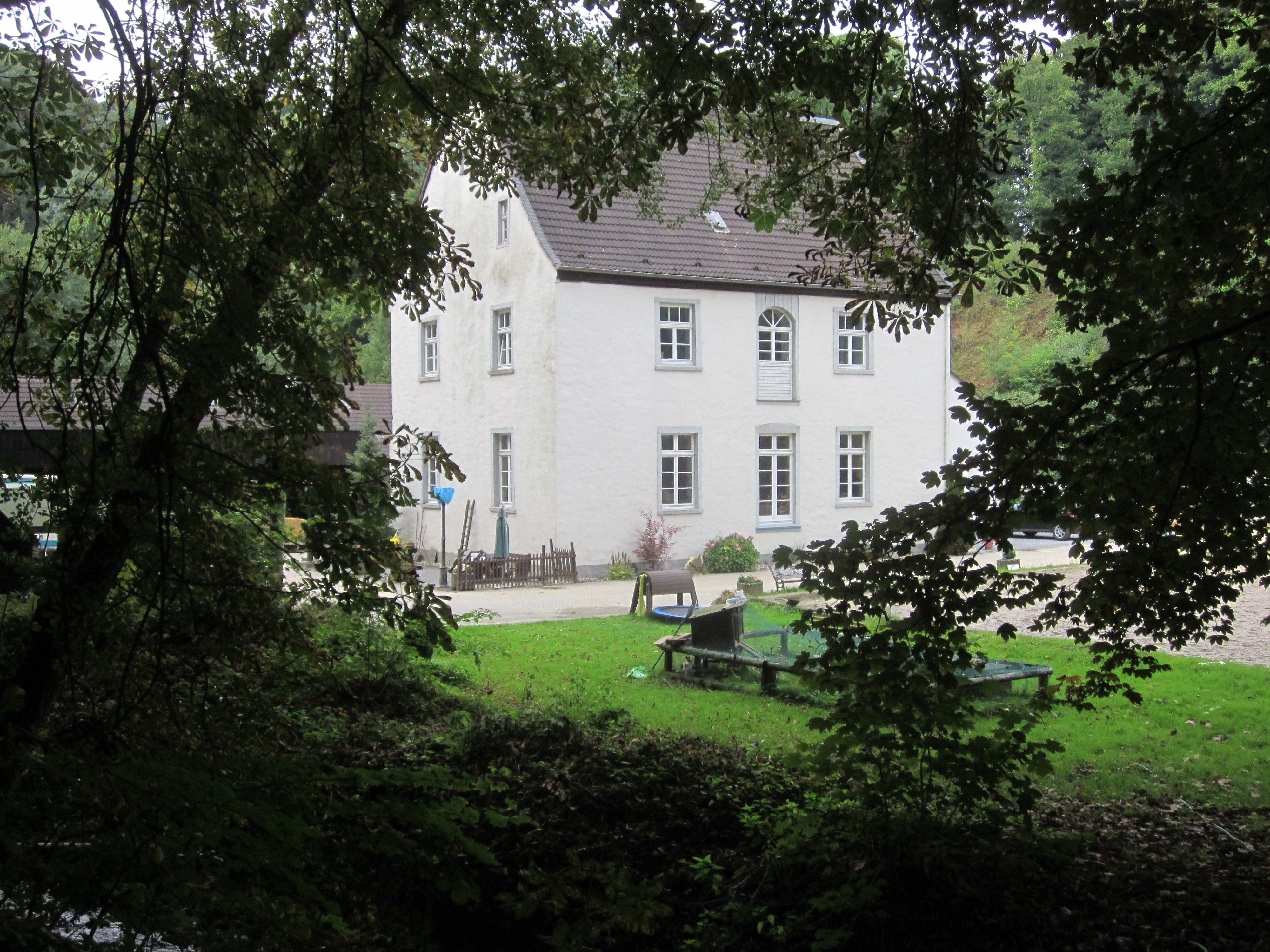 Rossdelle Rittergut Heiligenhaus Reiterhof Vogelsangbachtal